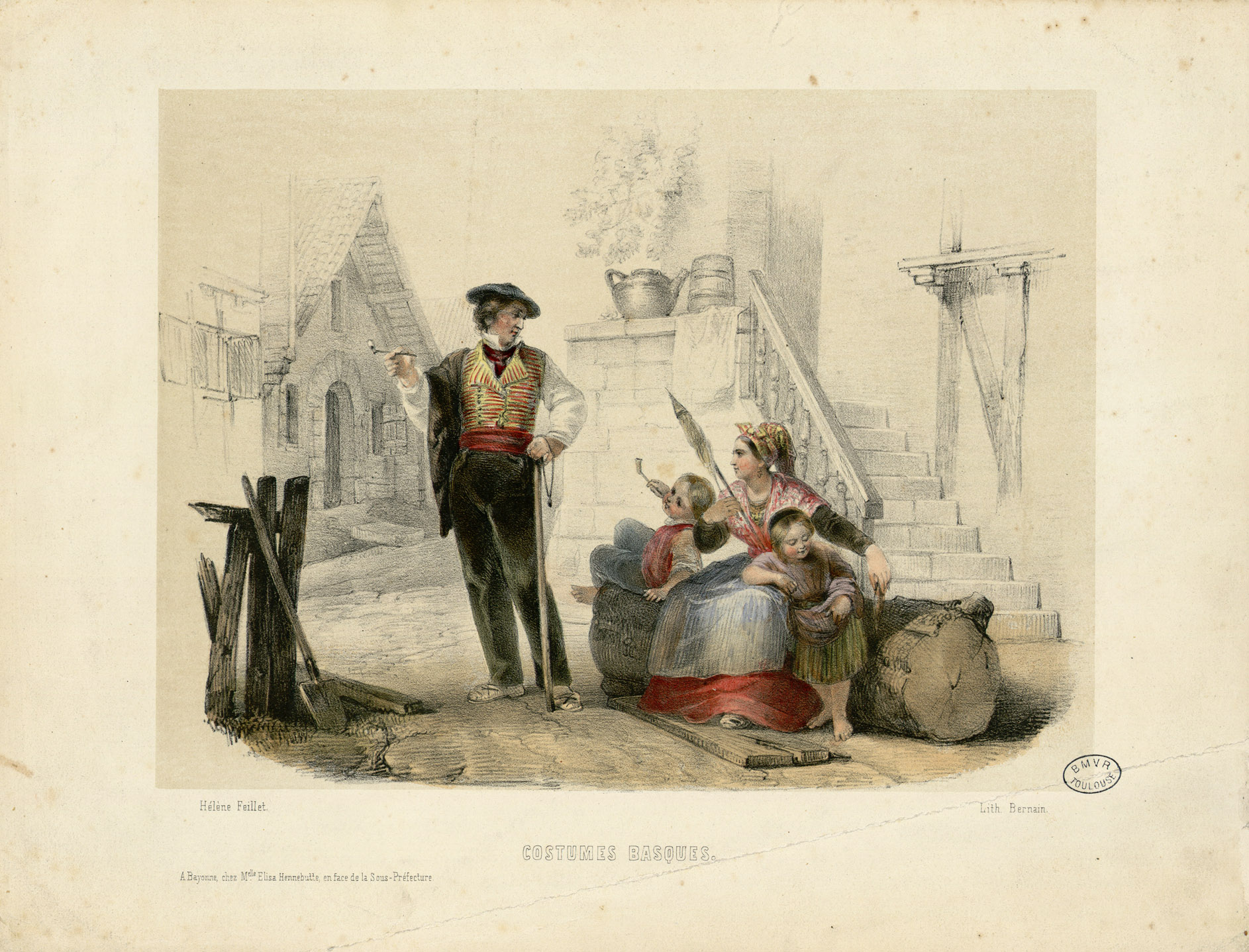 Fait partie d'un recueil de lithographies : pl. 1, 2, 6 et 7 imprimées chez Lemercier à Paris ; les pl. 6 et 7 sont extraites de Album des deux Frontières. La pl. 1 n'est pas la même que la pl. 12 de l'Album : au premier plan le pont est en bois et non en pierre. Pl. 3, 4, 5 et 9 lithographiées chez Lamaignère à Bayonne. La pl. 9, en coul., est d'Hélène Feillet. Pl. 8 et 10 lith. chez Bernain. La pl. 8, en coul., est d'Hélène Feillet. Ancely, René (1876 - 1966). Possesseur